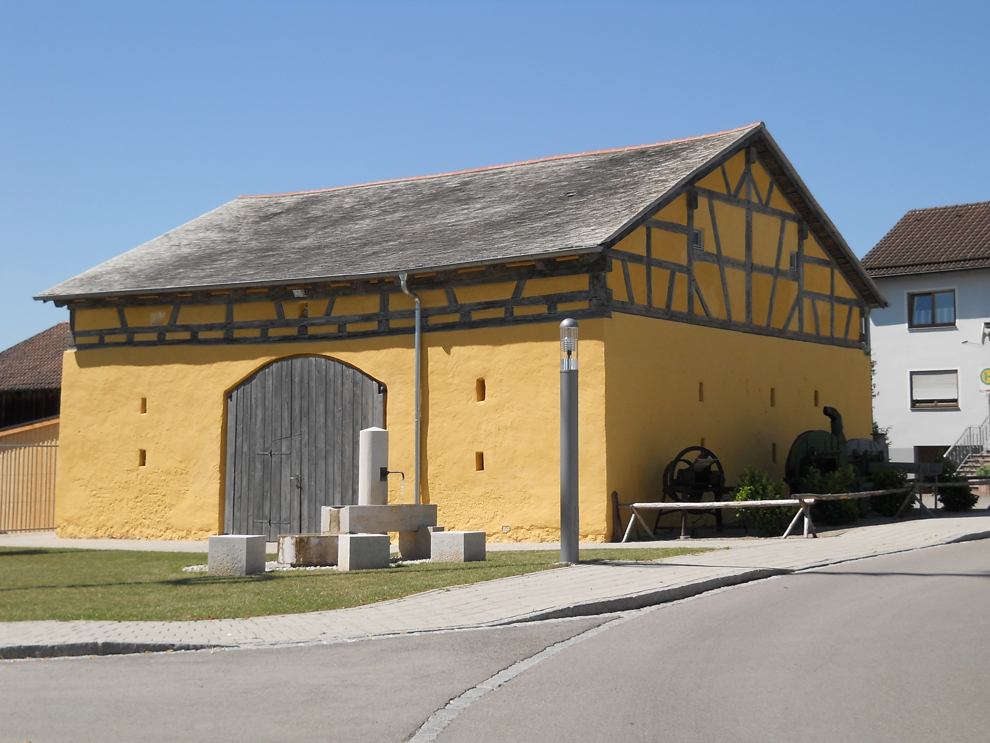 Historischer Zehendstadel in Biberg, Gemeindeteil von Kipfenberg im oberbayerischen Landkreis Eichstätt This is a photograph of an architectural monument.